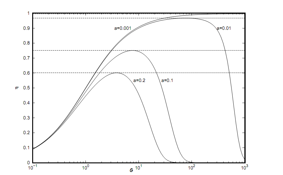 Curva csmacd